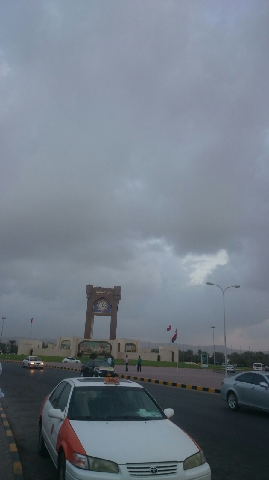 تجمع سيارات الأجرة حول البرج